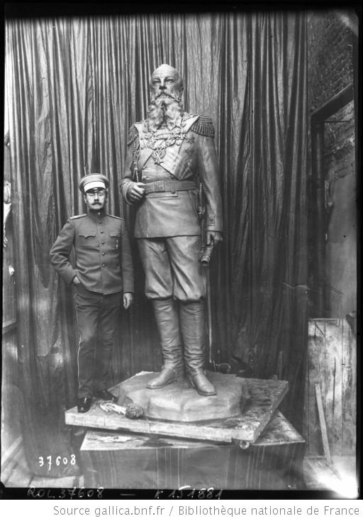 Le sculpteur russe colonel Samonoff (Самонов Петр Александрович) et la statue du grand duc Michel Nicolaievitch : [photographie de presse] / [Agence Rol]